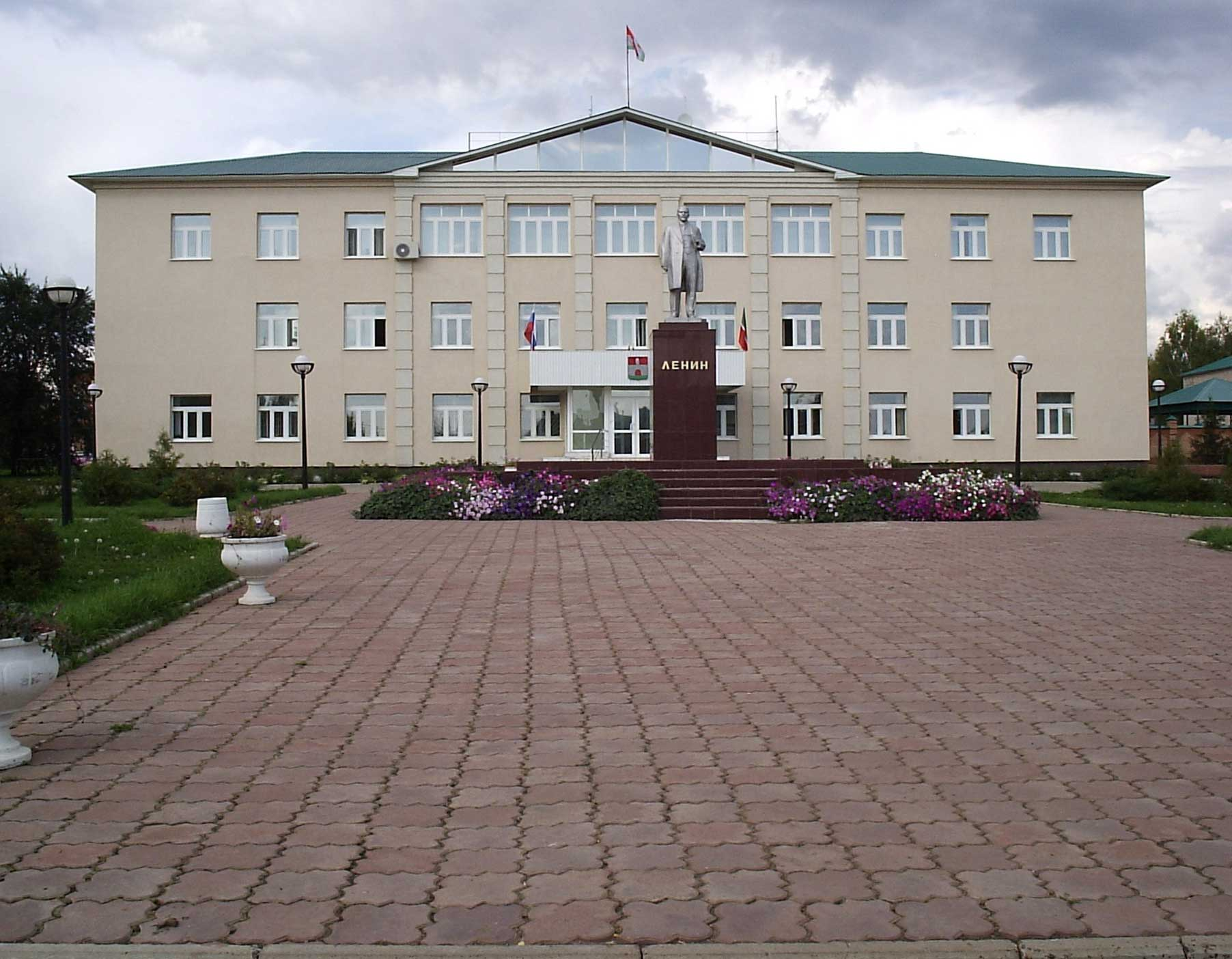 Здание совета местного поселения Черемшанского муниципального района